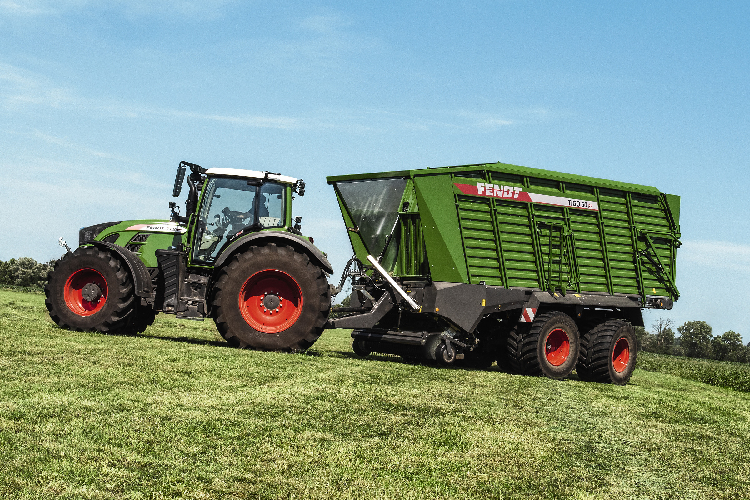 Fendt Tigo 60 PR